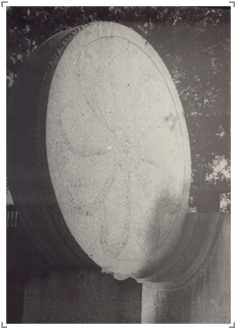 清朝石鼓实图